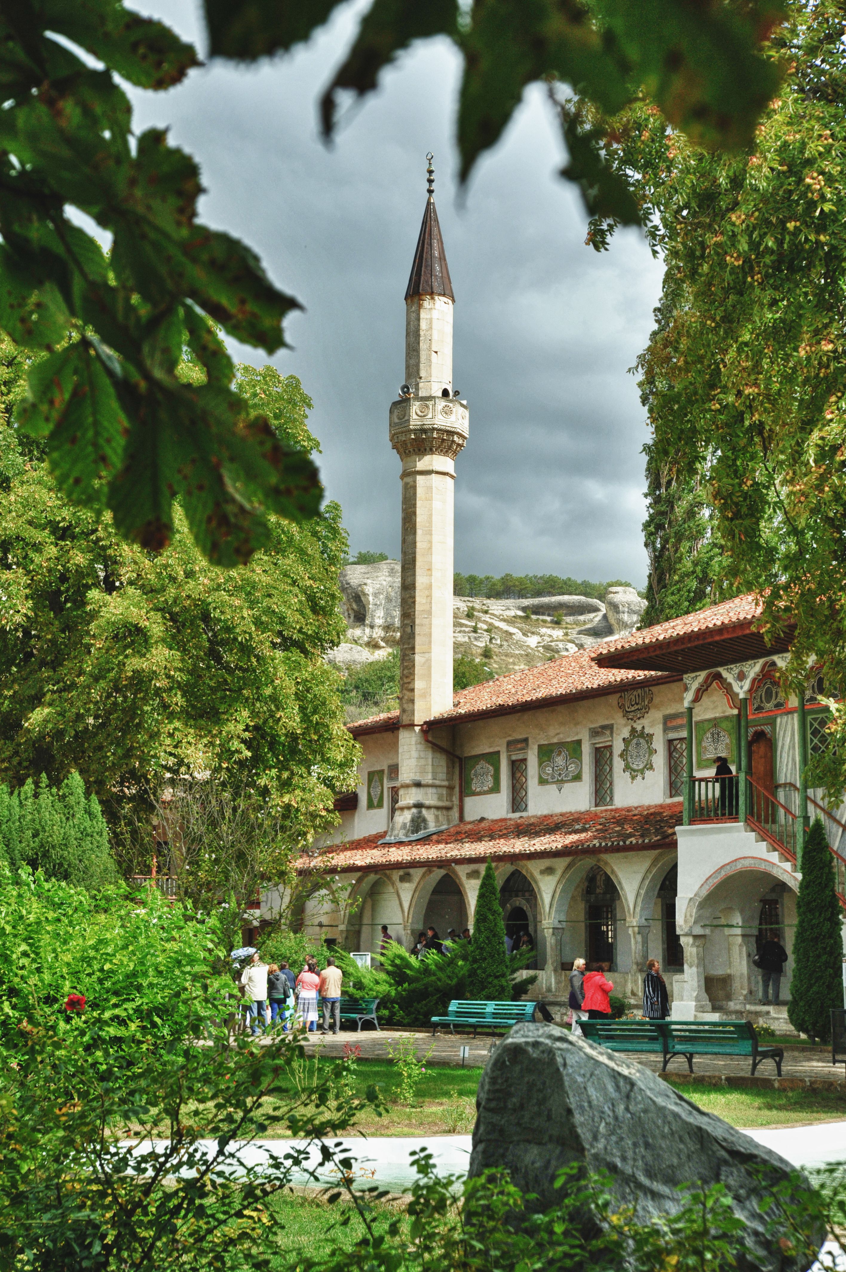 Бахчисарайський палацово-парковий комплекс (Ханський палац), Бахчисарай, вул. Річкова, 133